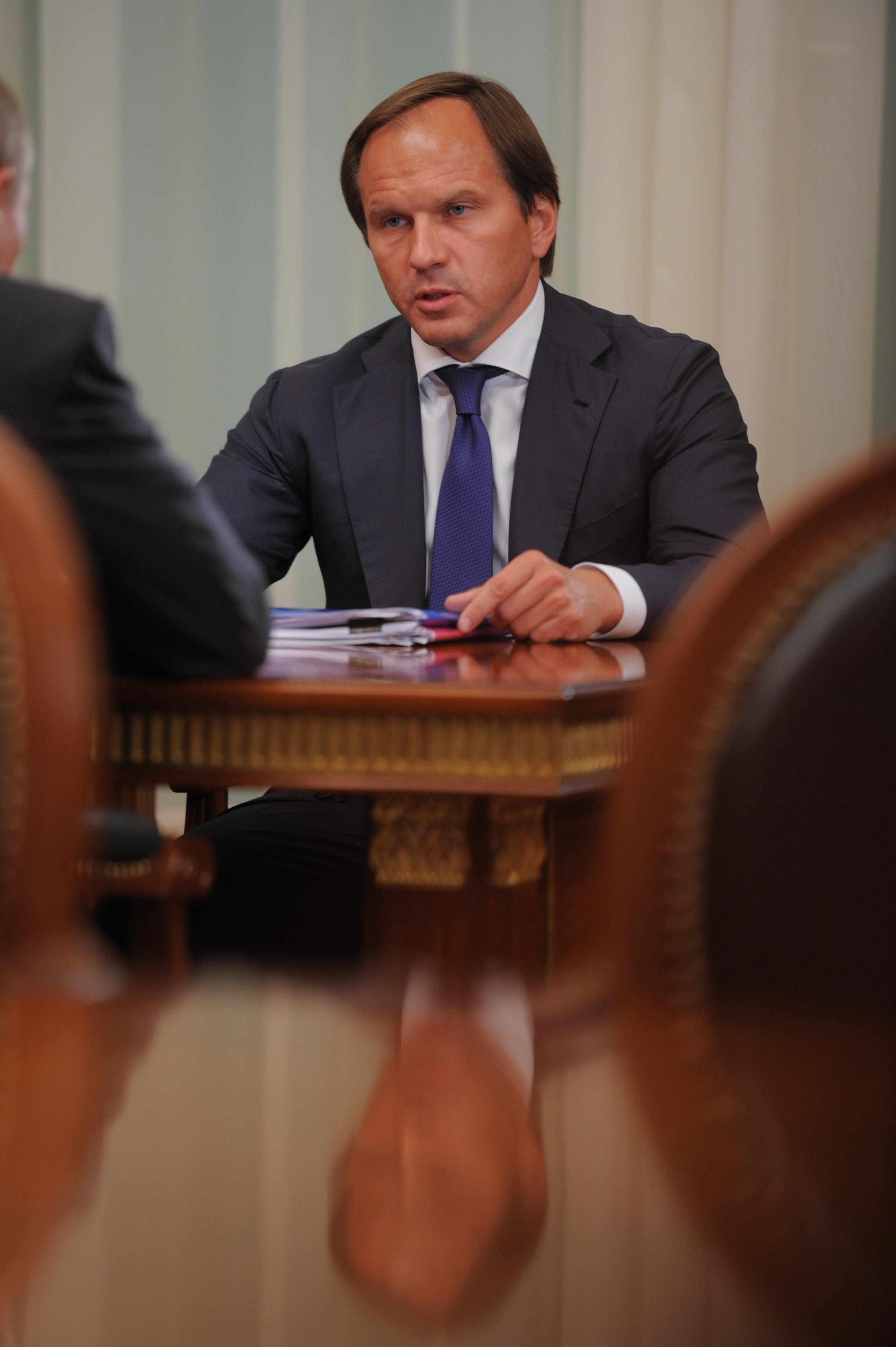 Губернатор Красноярского края Л. В. Кузнецов на встрече с Председателем Правительства Российской Федерации В. В. Путиным